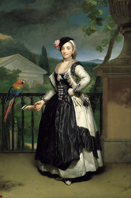 Retrato de Isabel de Parreño y Arce, marquesa de Llano y esposa de José Agustín de Llano.